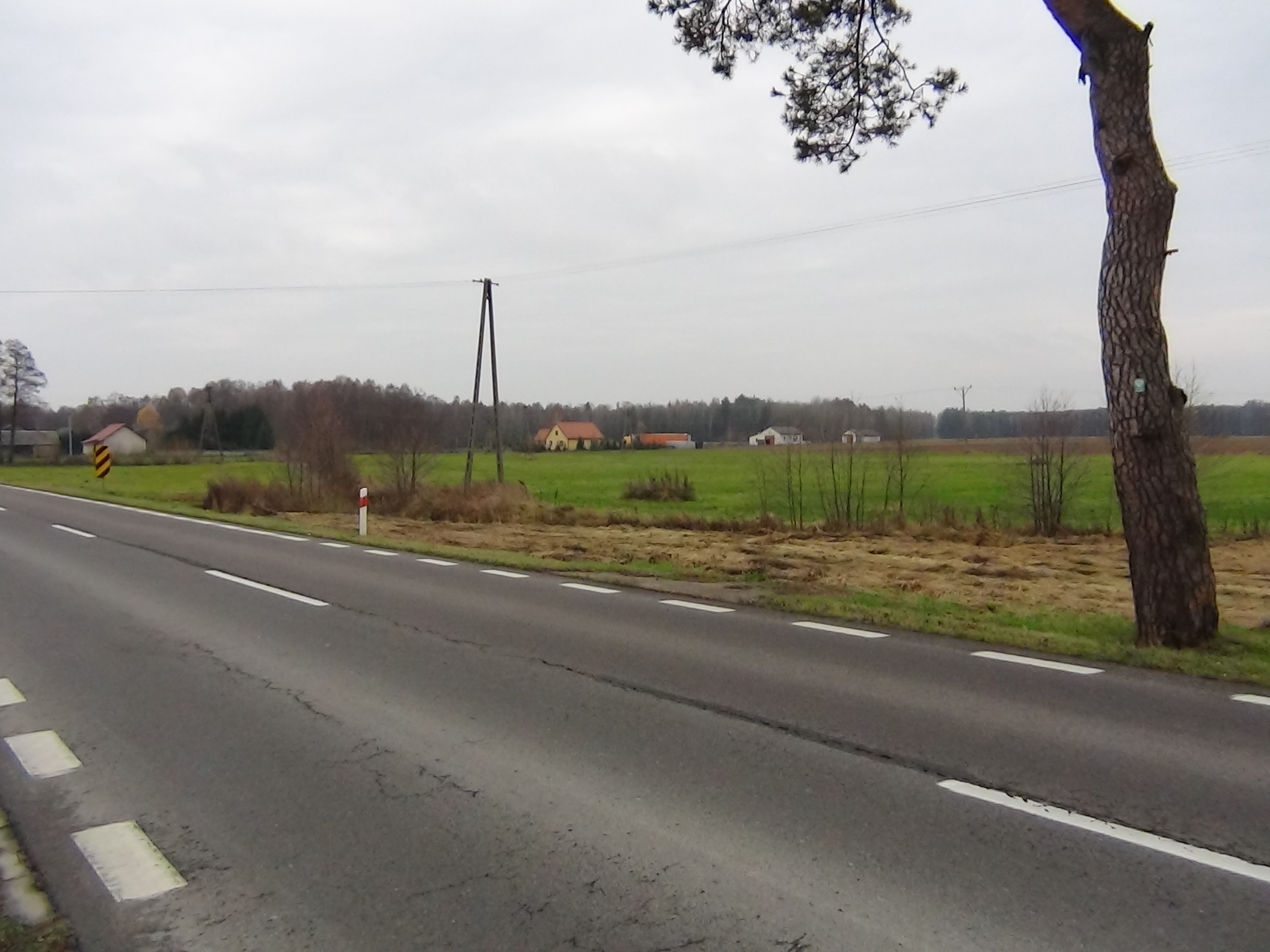 Rabędy - wieloletnia sosna